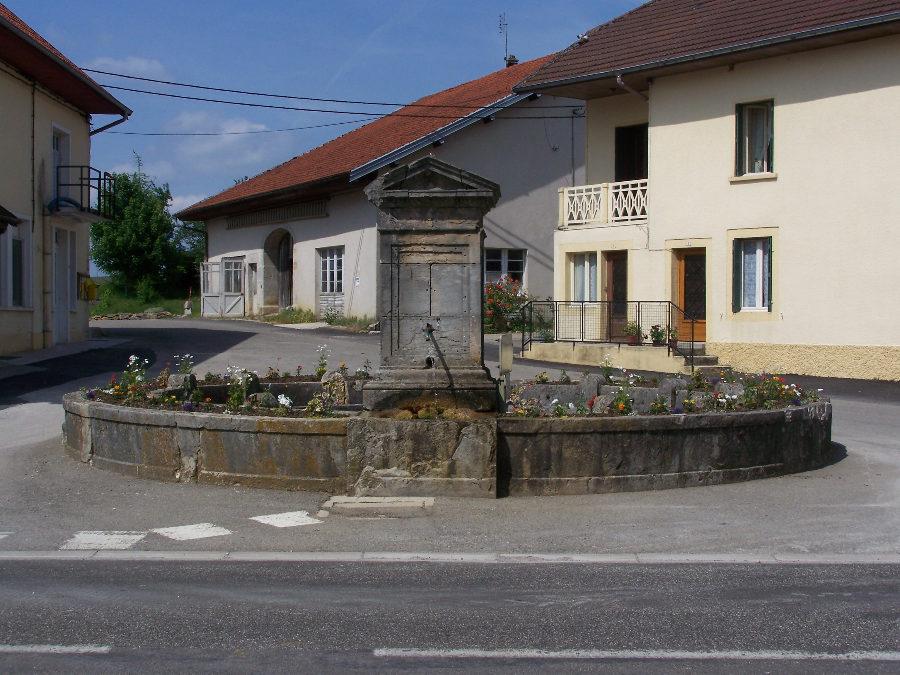 Fontaine à Cernans, dans le Jura